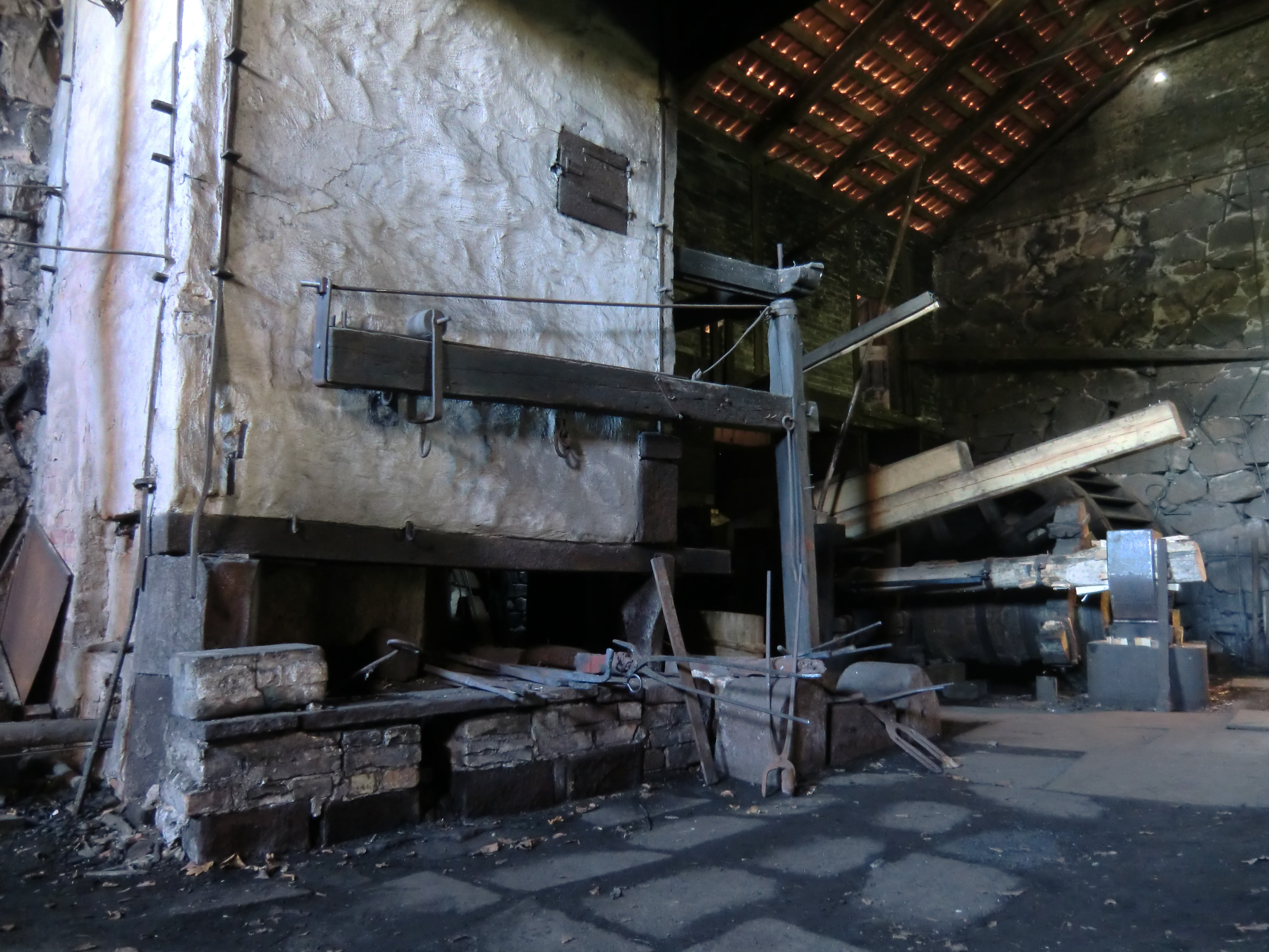 Vallonhärd och stångjärnshammare i Vallonsmedjan.